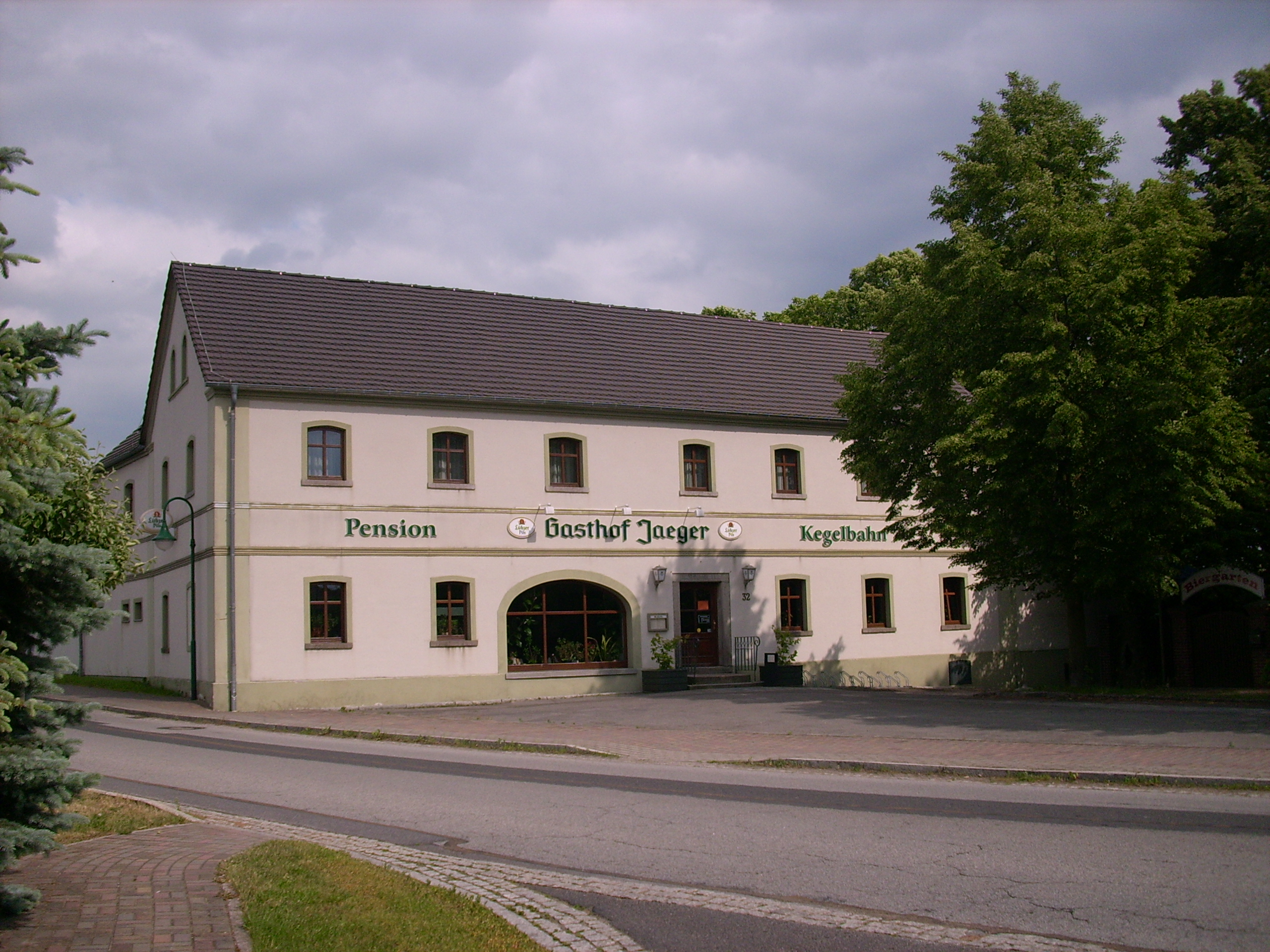 Gasthof in Seidewinkel (Elsterheide)